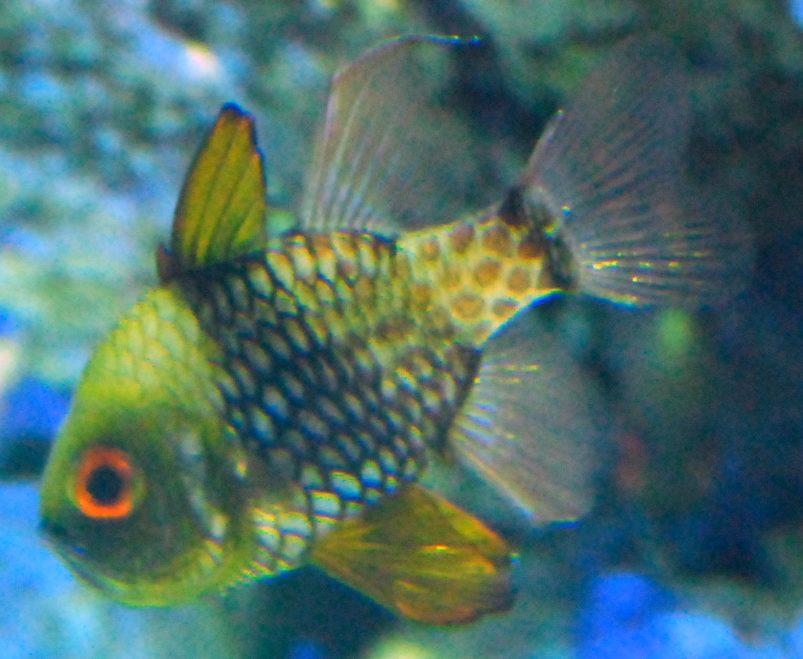 Sphaeramia nematoptera 丝鳍高身天竺鲷